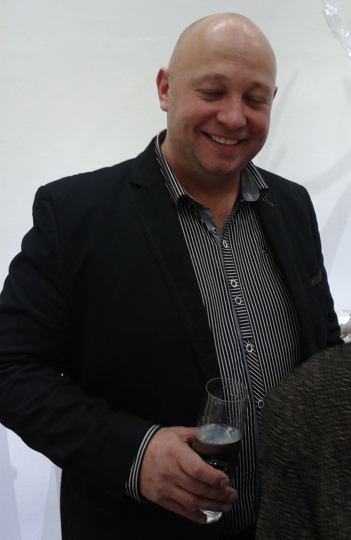 Jiří Pačinek (* 3. července 1972 v Litoměřicích) - český umělecký sklář (na oslavě 96. narozenin českého uměleckého skláře a sklářského výtvarníka René Roubíčka) v pondělí 22. ledna 2018 v Tripartit gallery (na adrese: Benediktská 9, Praha 1) na vernisáži výstavy "RENÉ ROUBÍČEK 96 let - Dámské součástky a jiné podivnosti".